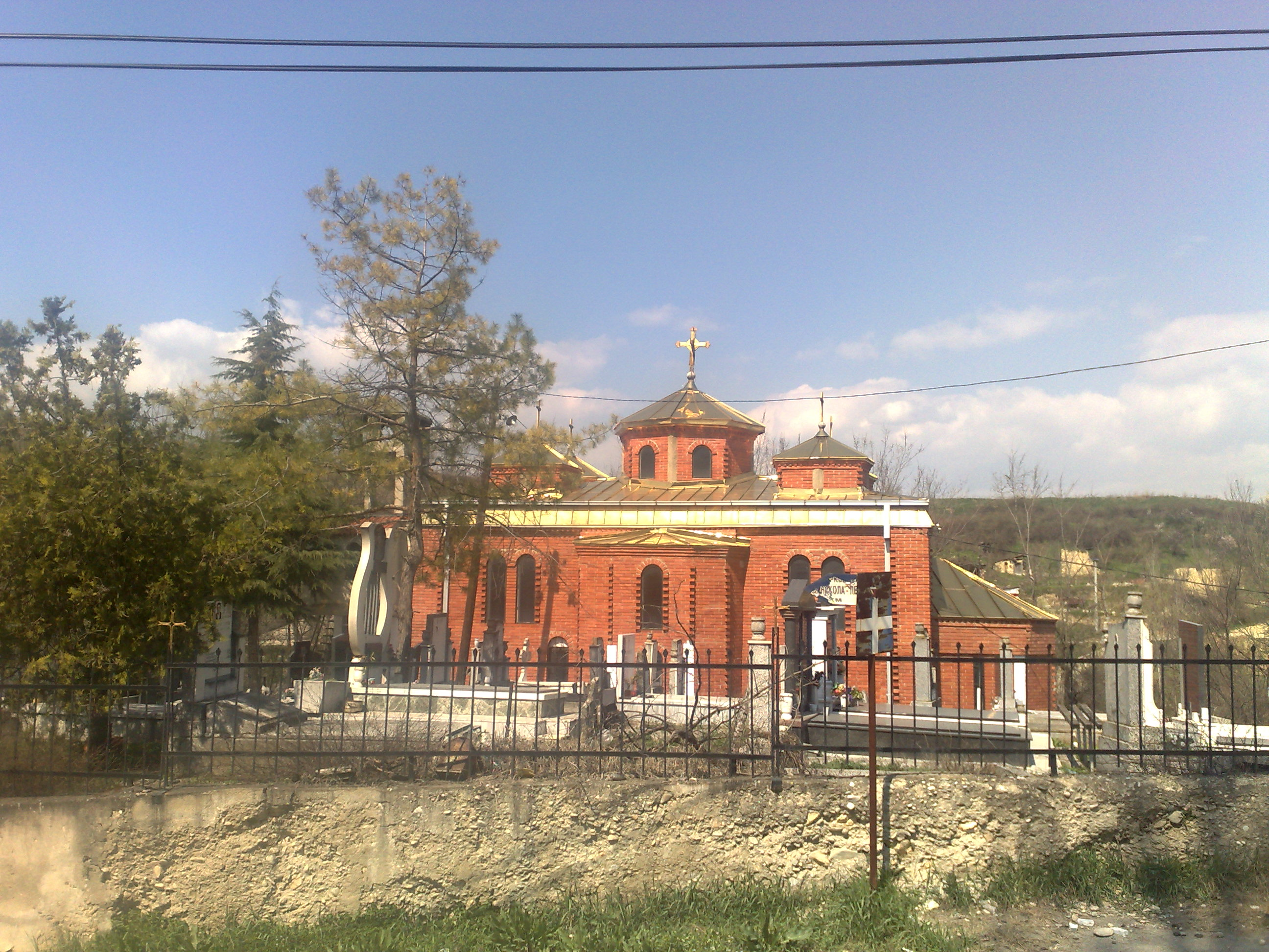 Црквата Свети Атанасиј во селото Усје